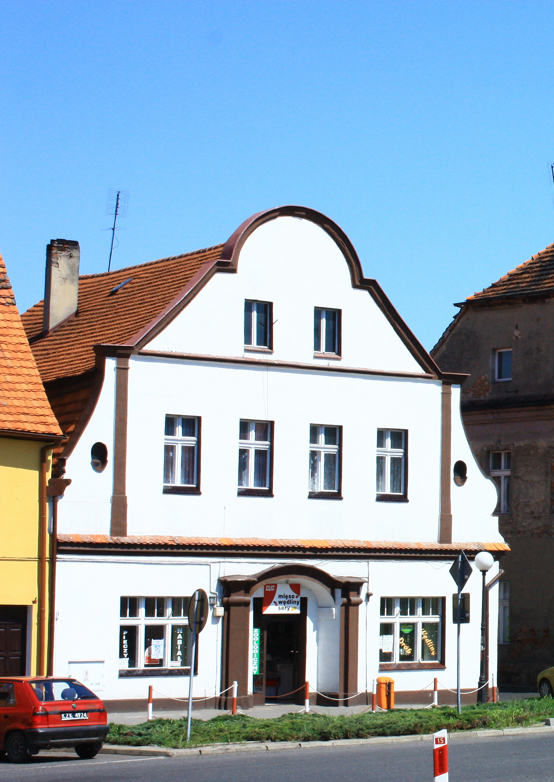 Zduny, dom, XVIII, XIX